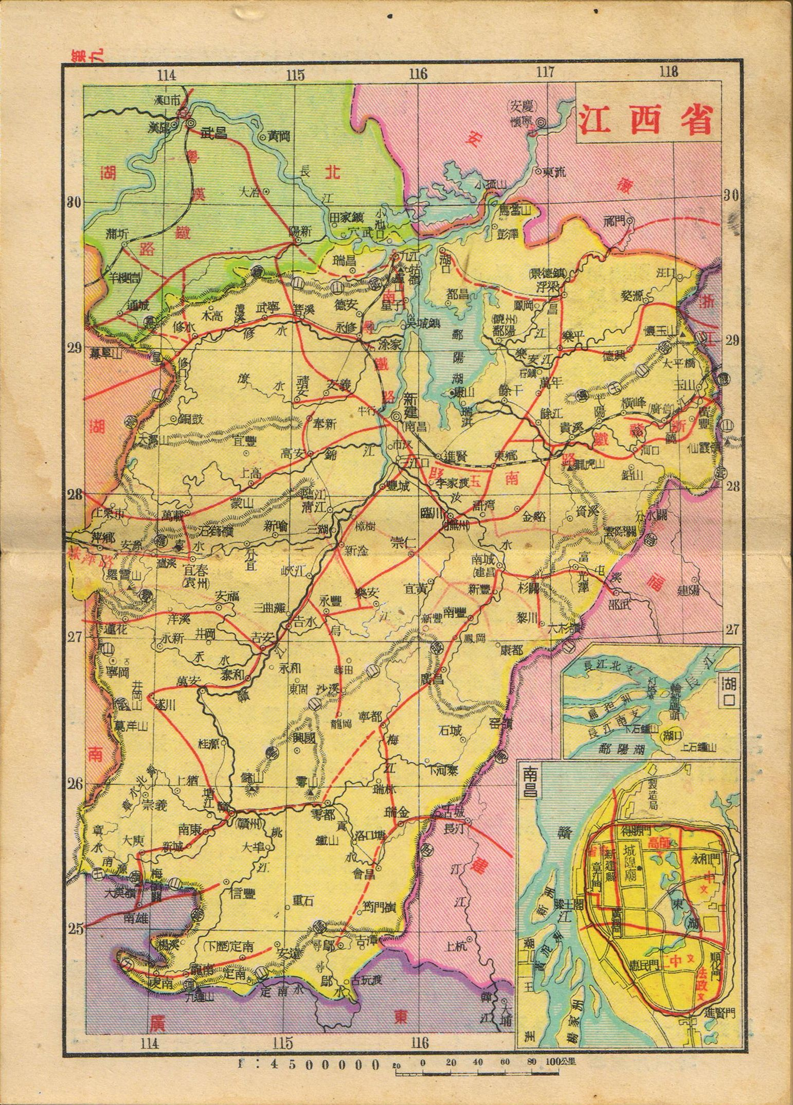 亚新地学社1936年《袖珍中华全图》江西省